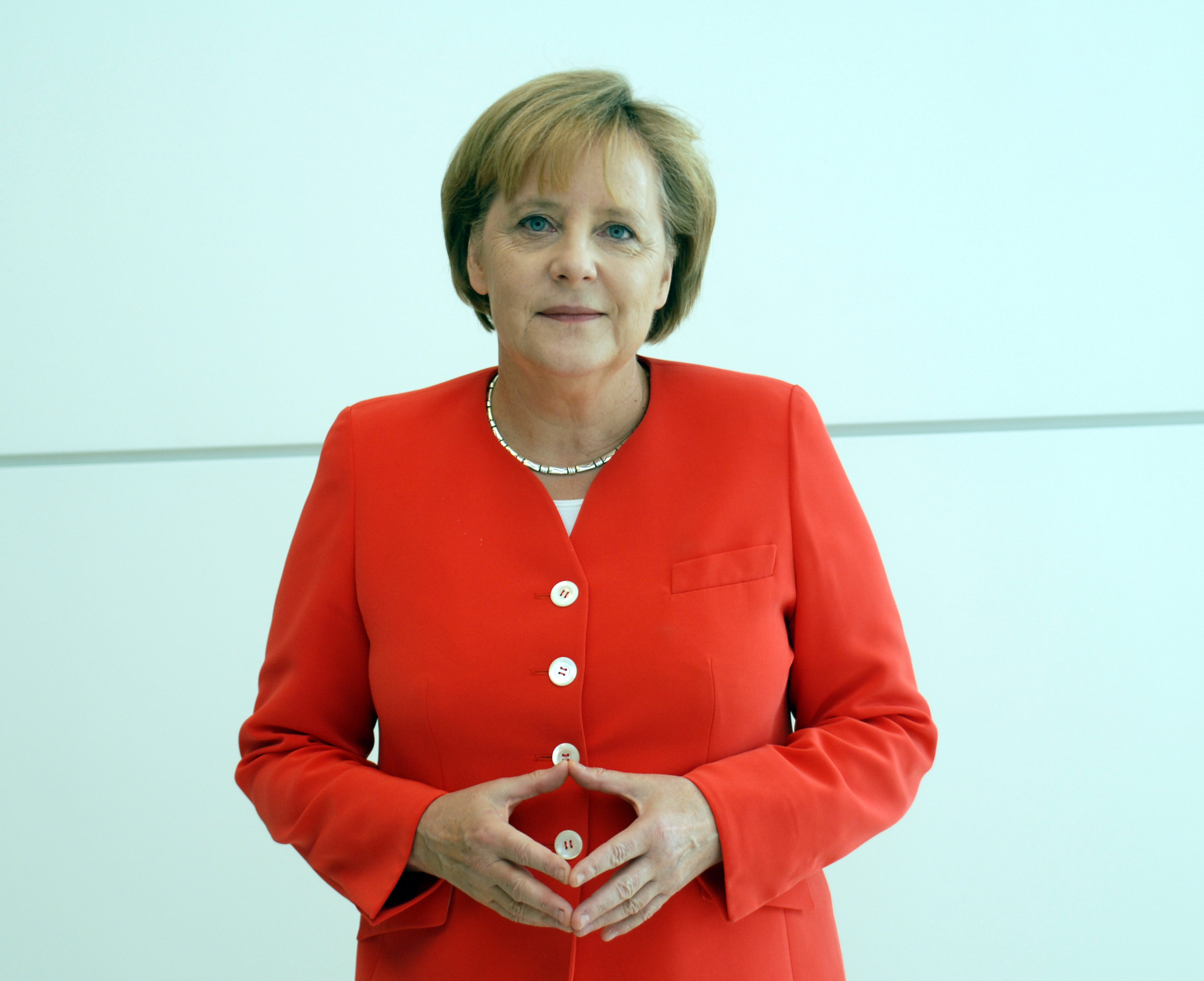 Dr. Angela Merkel Bundeskanzlerin der Bundesrepublik Deutschland Vorsitzende der CDU Deutschlands